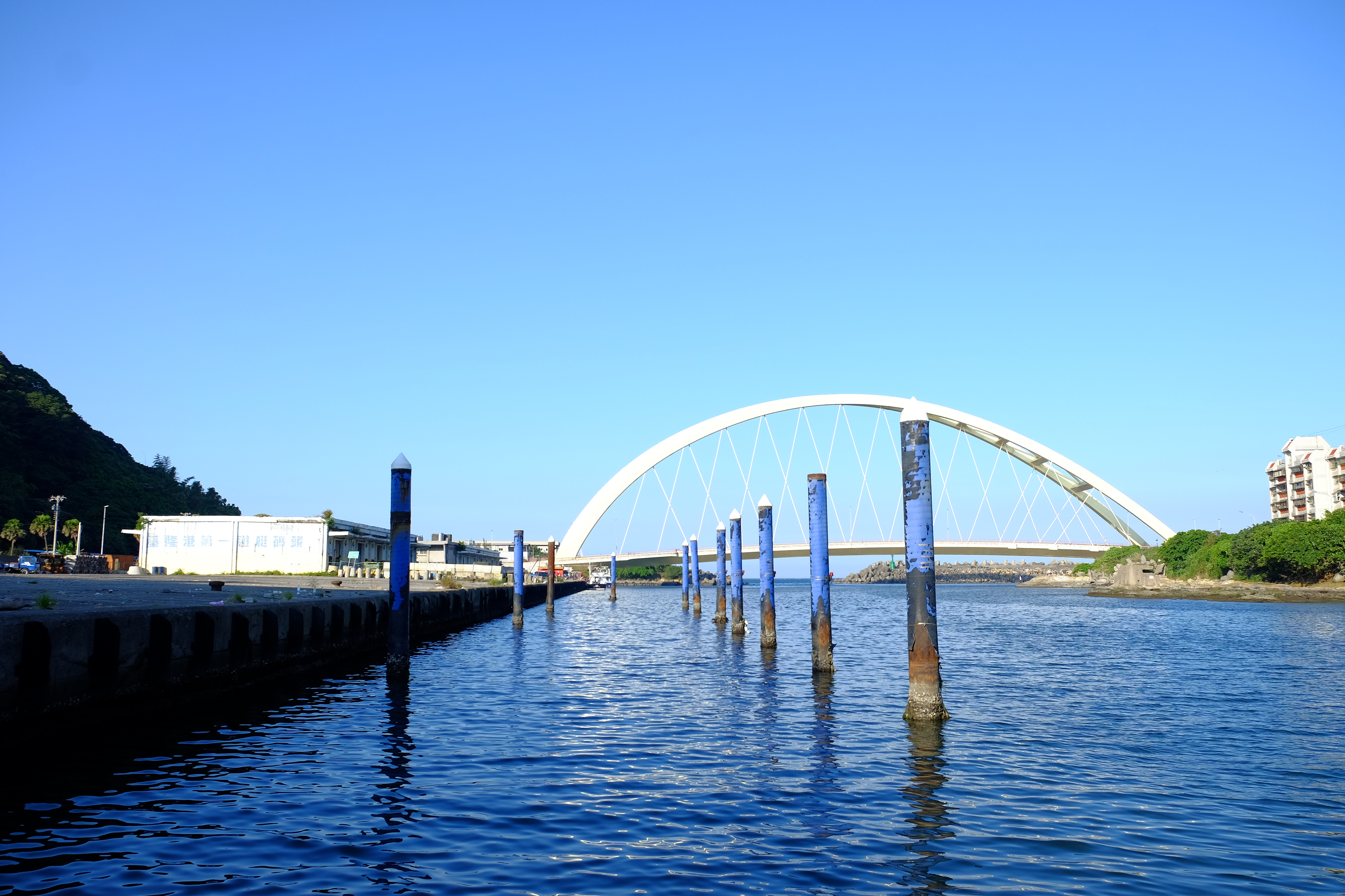 和平島社寮橋